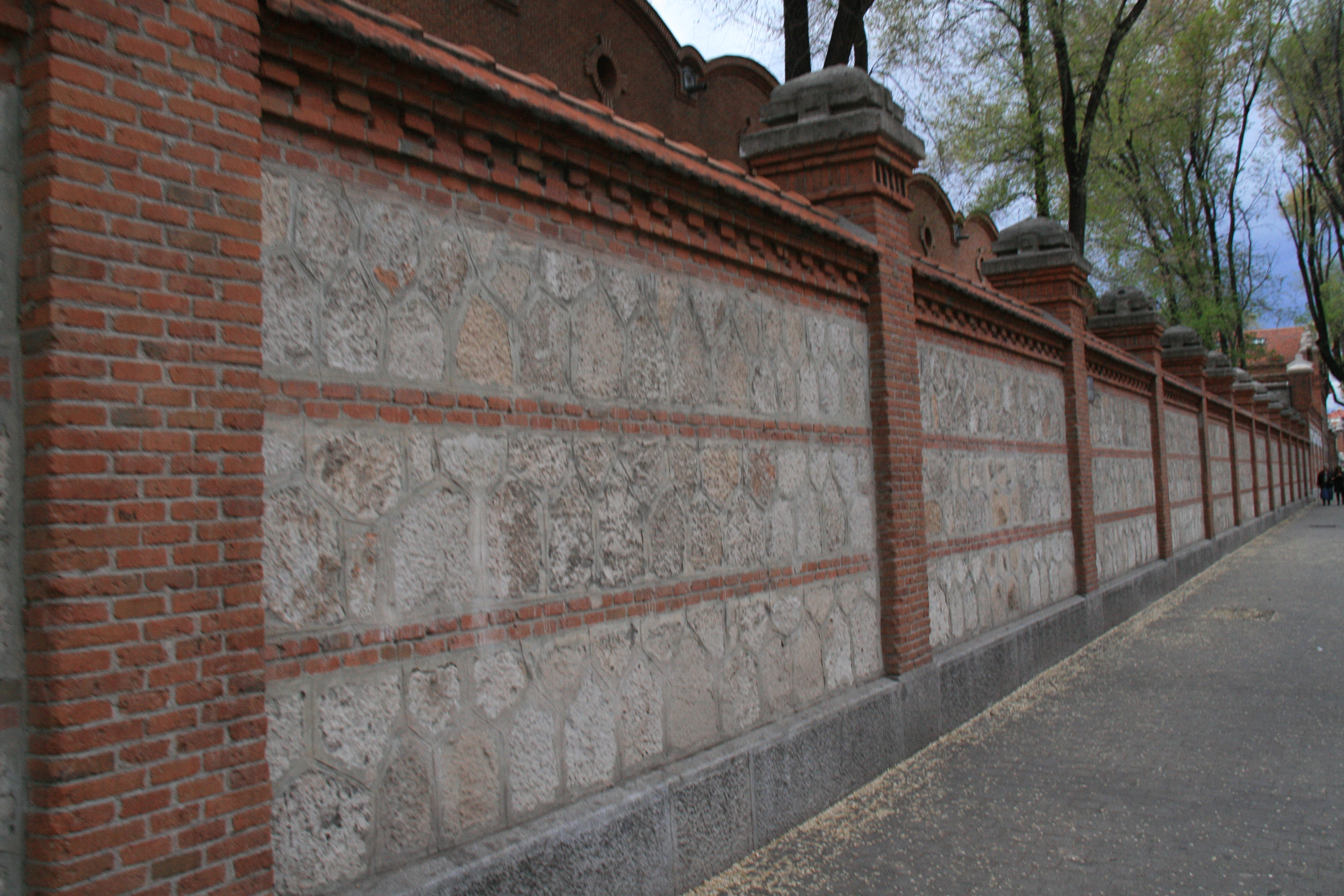 Paseo del Olmo